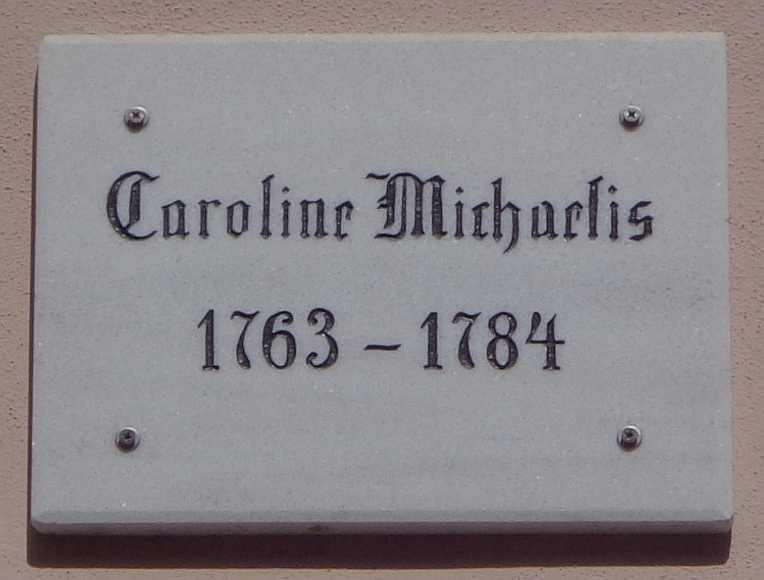 Göttinger Gedenktafel für Caroline, geb. Michaelis (verw. Böhmer, gesch. Schlegel, verh. Schelling, 1763–1809), Schriftstellerin, am "Michaelishaus" in der Prinzenstraße 21.